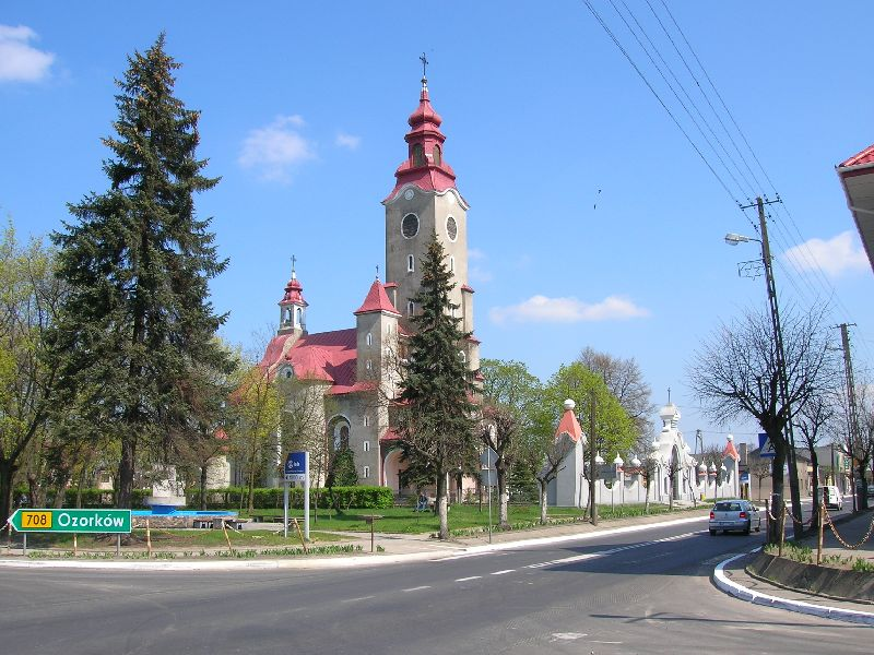 Stryków - kościół.